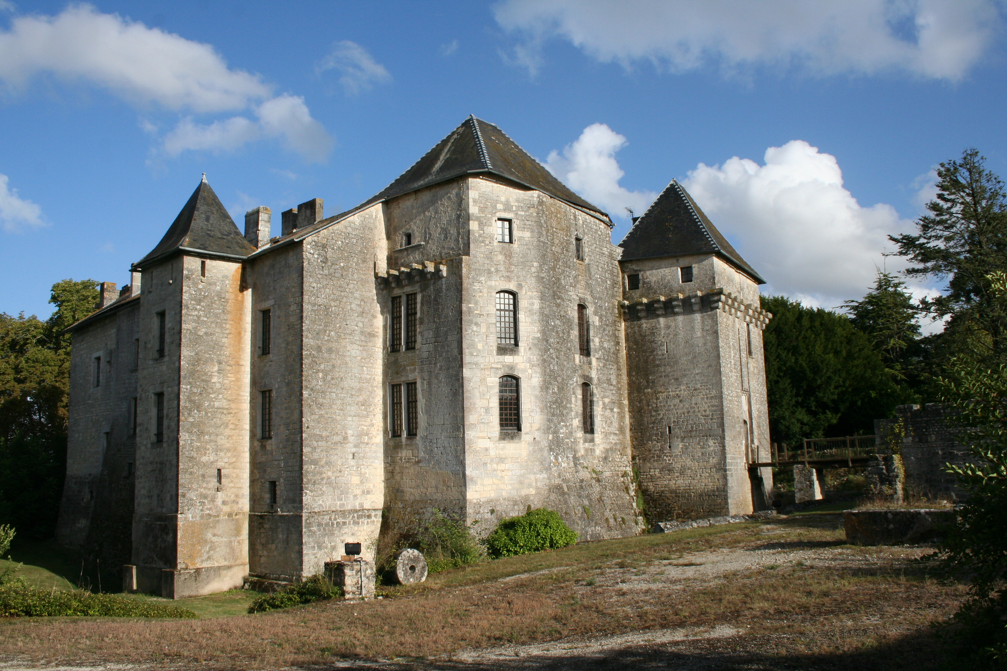 La façade du chateau de Gourville.